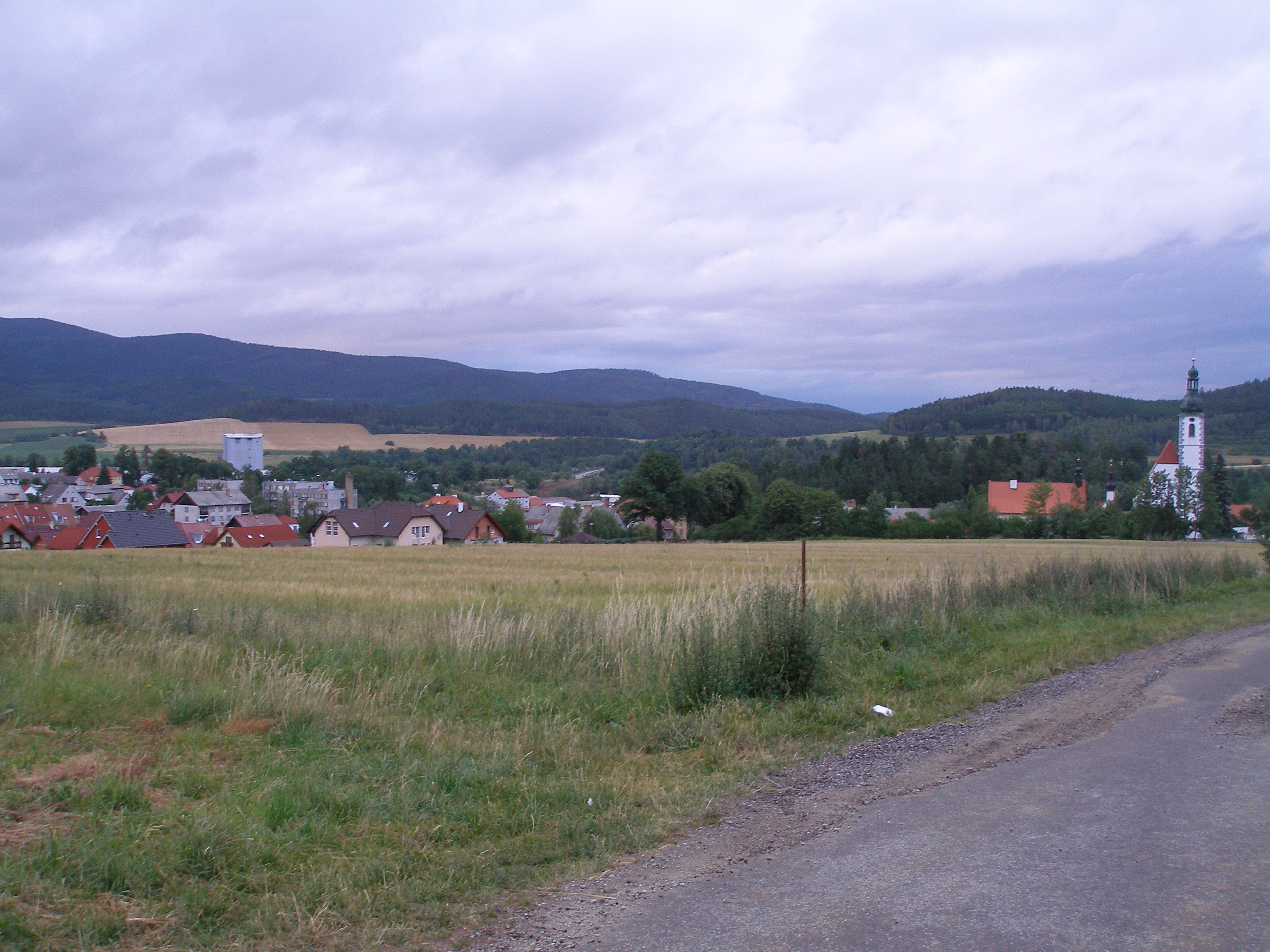 Kostel nanebevzetí Panny Marie v Kájově a přilehlá číst obce